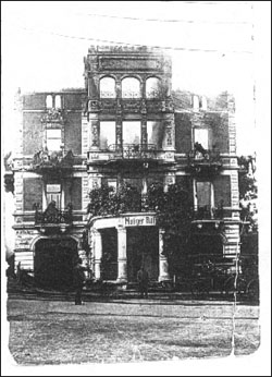 Feuerwehrfoto Brand des Mutigen Ritters in Kösen 1916